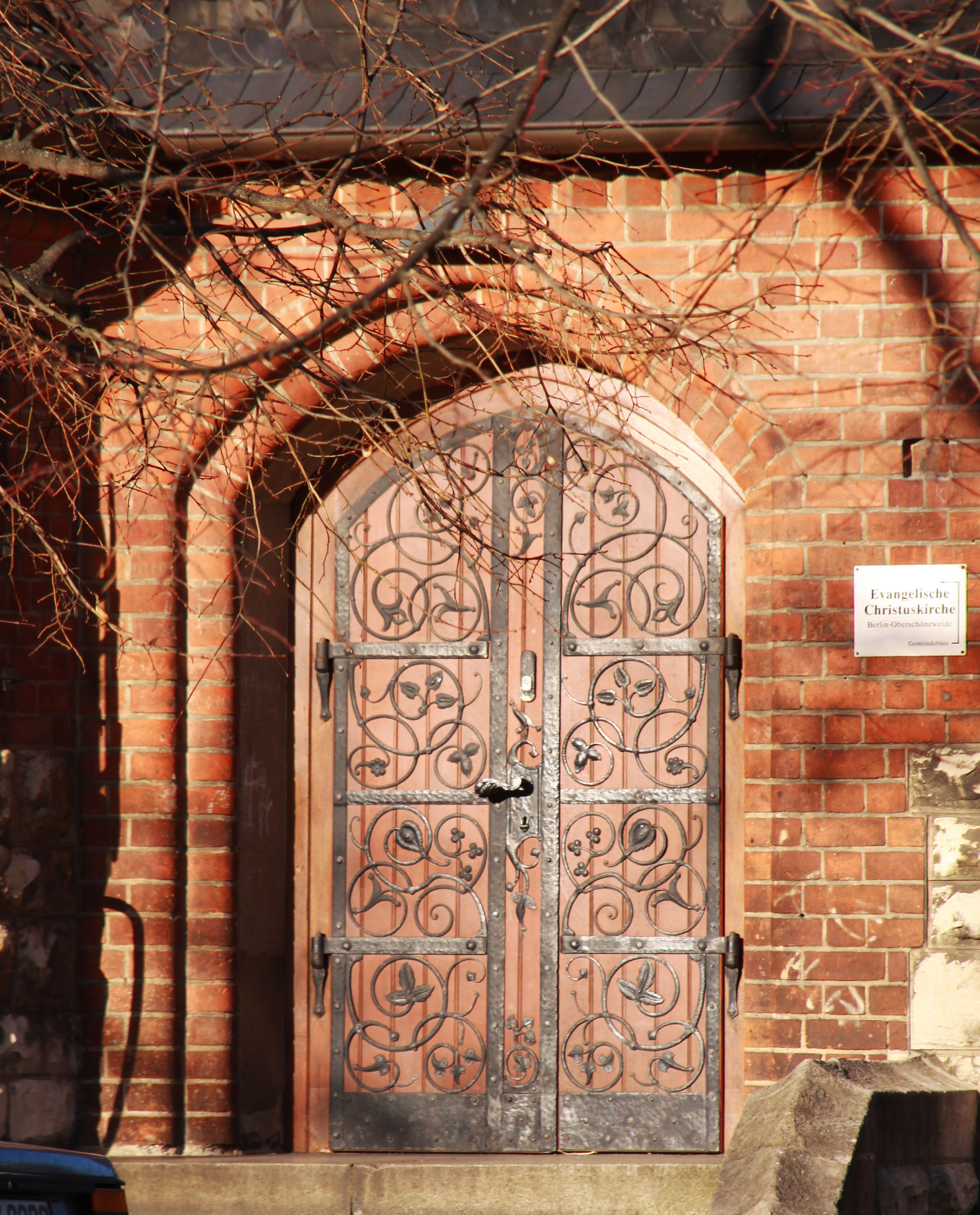 Evangelische Christuskirche,Berlin Oberschöneweide